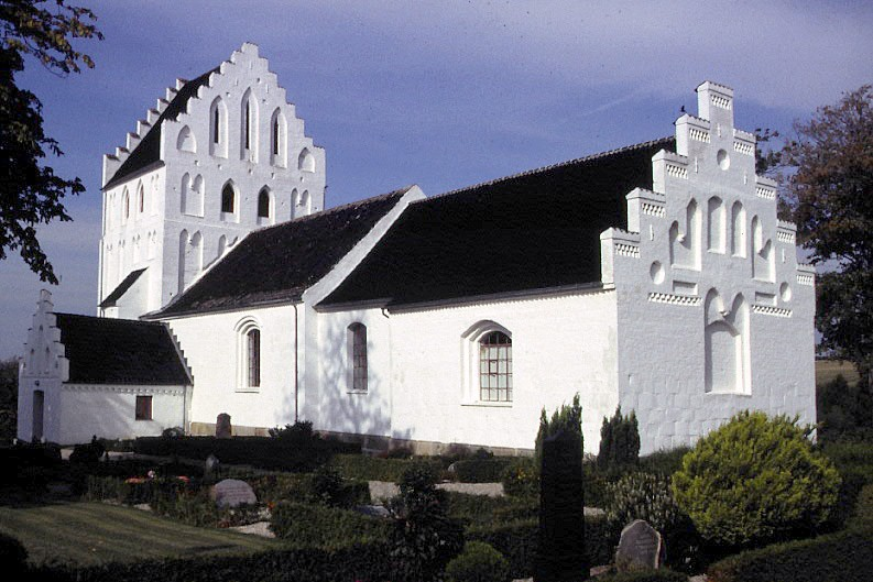 Asperup Kirke i Danmark. Asperup kirke